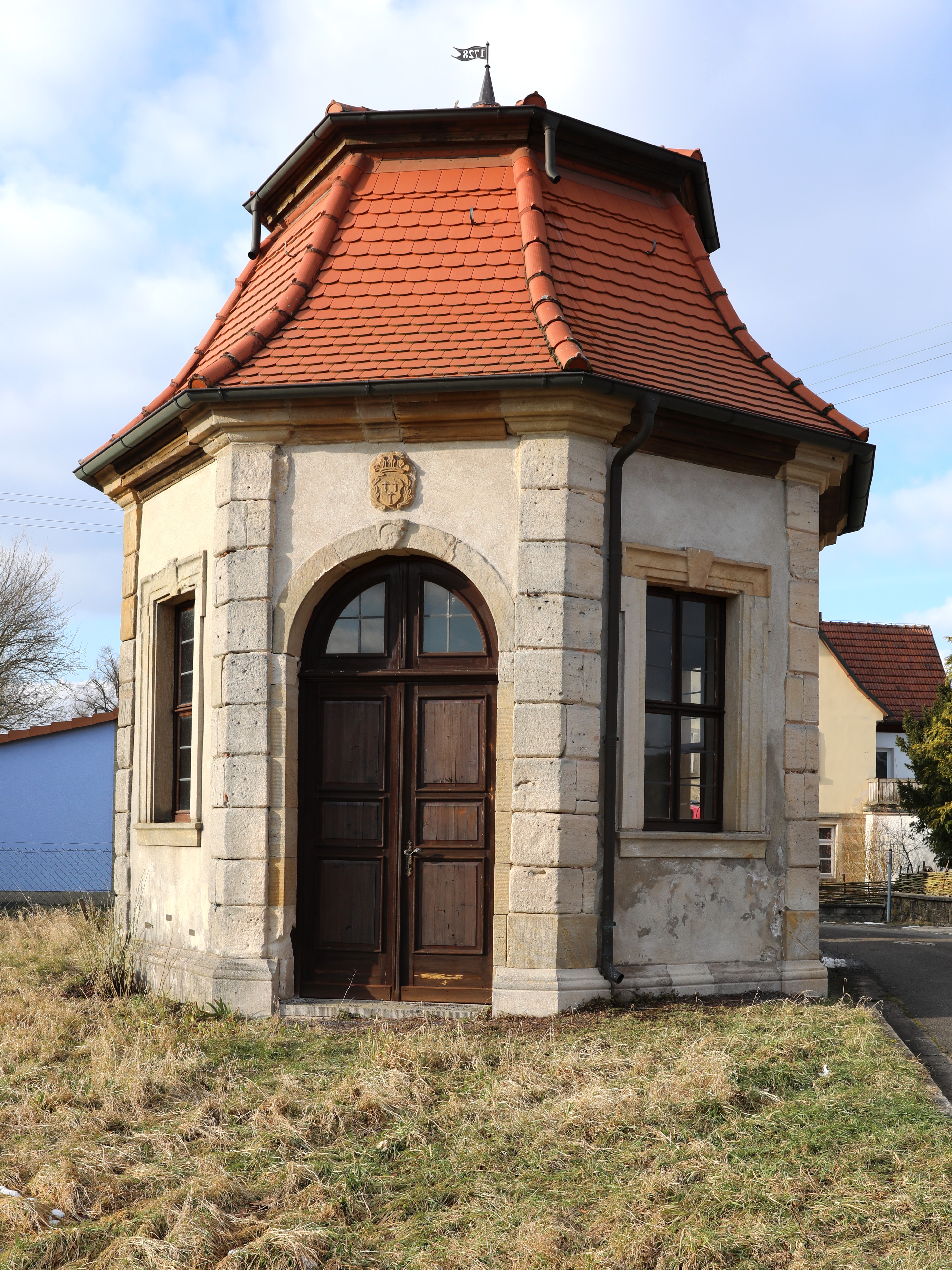 Marbach, Leissenturm "Schiesshütte"